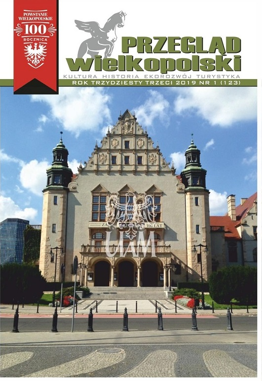 Okładka nr 1 (123) z 2019 roku kwartalnika "Przegląd Wielkopolski" wydawanego przez Wielkopolskie Towarzystwo Kulturalne w Poznaniu